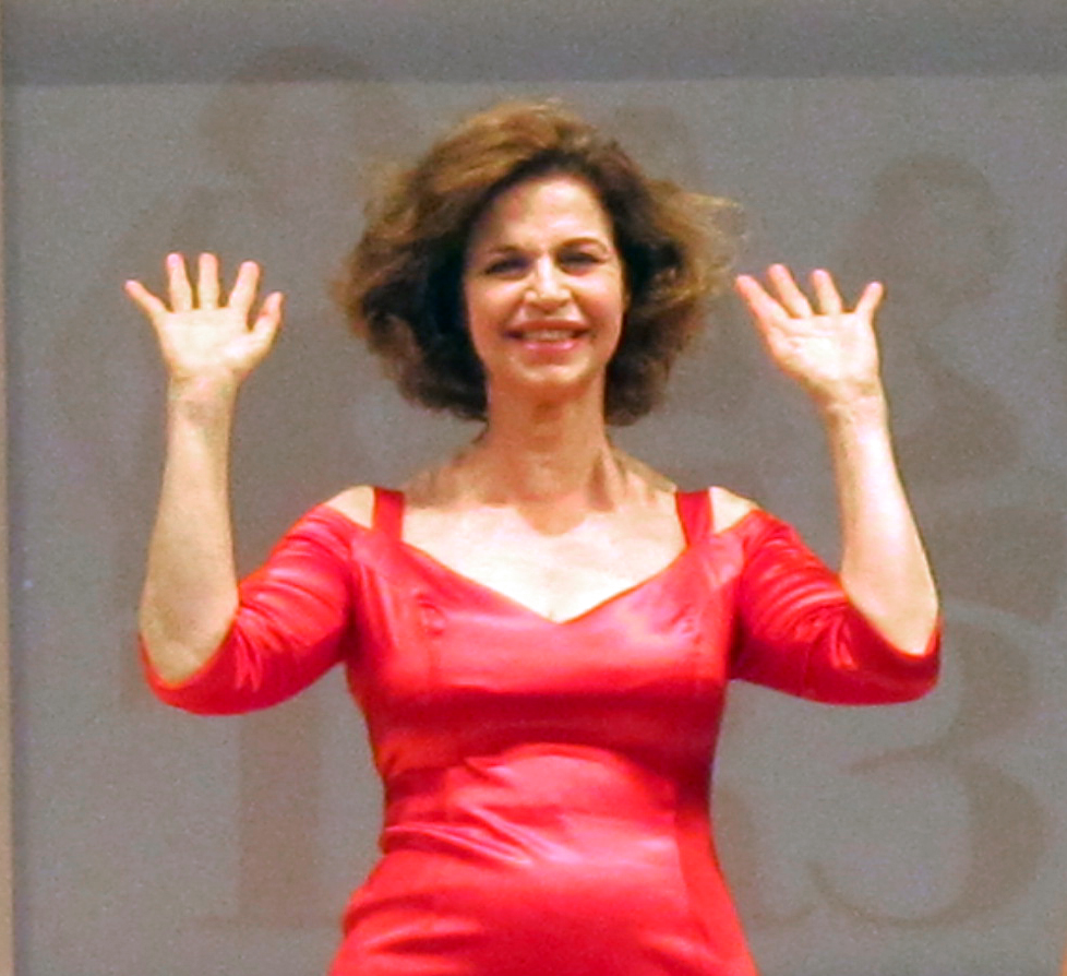 Teatro Giuseppe Verdi (Firenze)